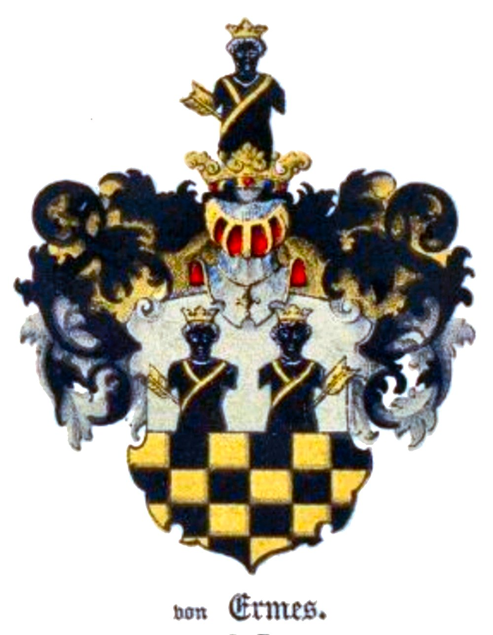 Ermesi suguvõsa aadlivapp